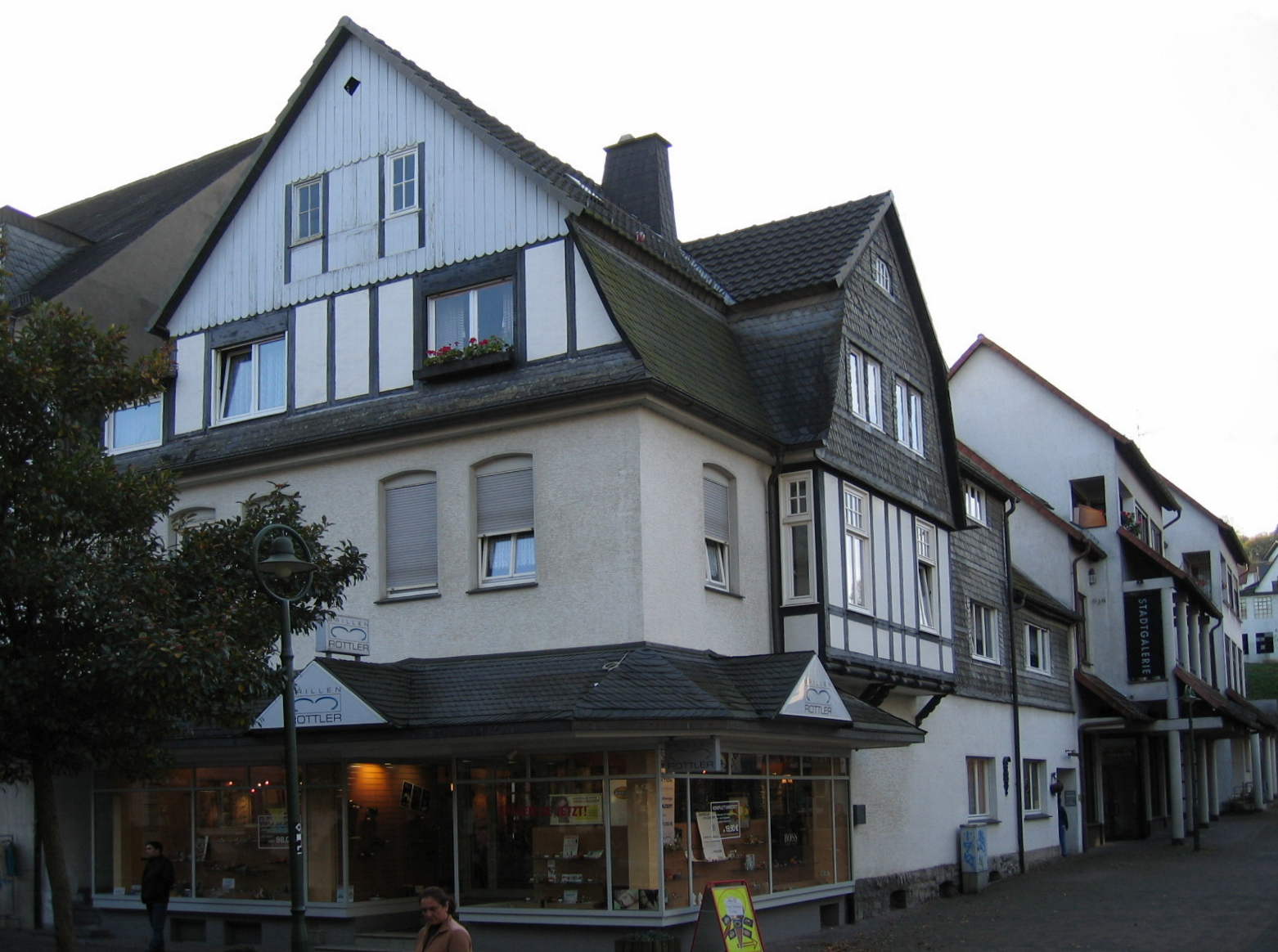 Description: Fachwerkhaus Hauptstraße 89 in Sundern Source: selbst fotografiert Date: 31. Okt. 2005 Author: Bubo